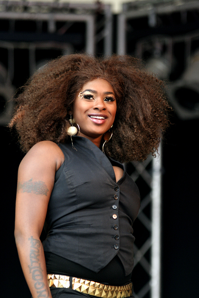 Nathalie Makoma tijdens Vlaggetjesdag (2008)